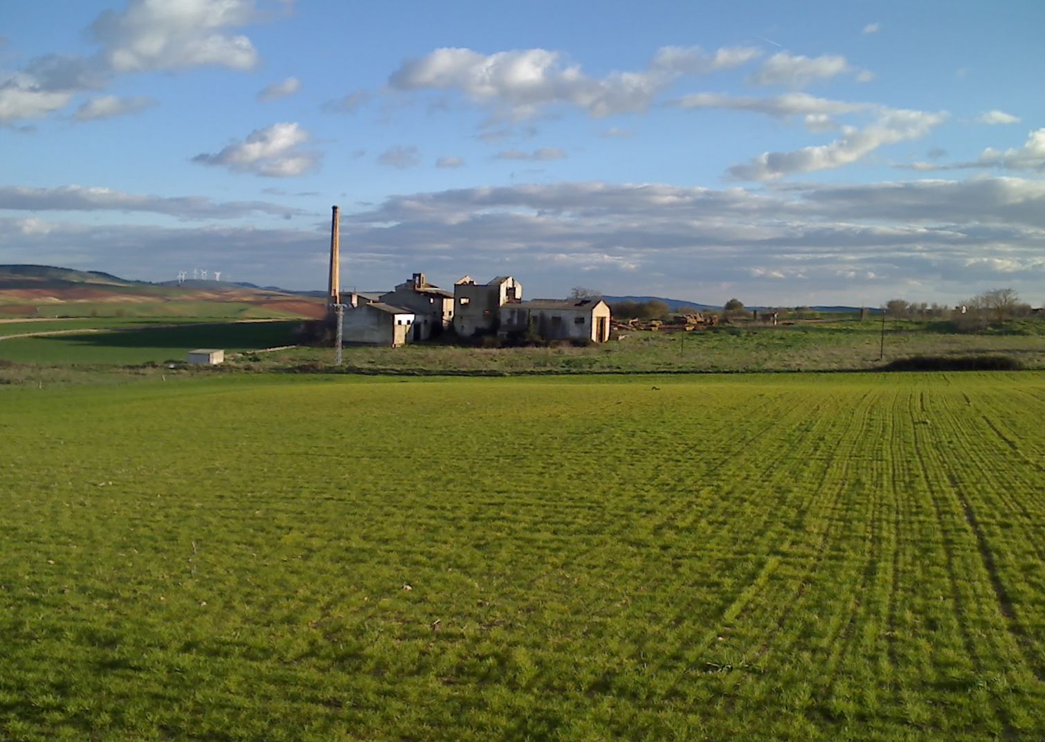 Campo cultivado y antigua fábrica de aceite de Vellisca (Provincia de Cuenca - España).